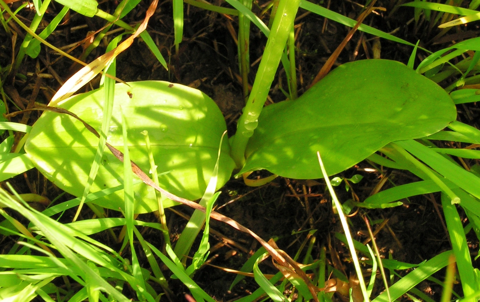 Platanthera bifolia. Moscow region, Russia.